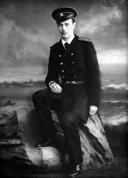 Сын императора Александра III великий князь Георгий Александрович